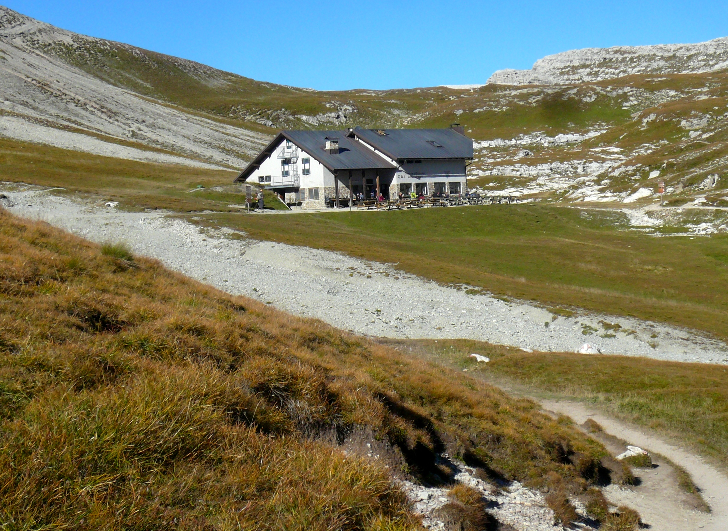 die Puezhütte (2475 m) in der Puezgruppe der Dolomiten von Südwesten auf dem Weg von der Furcela Forces de Sieles (2505 m)